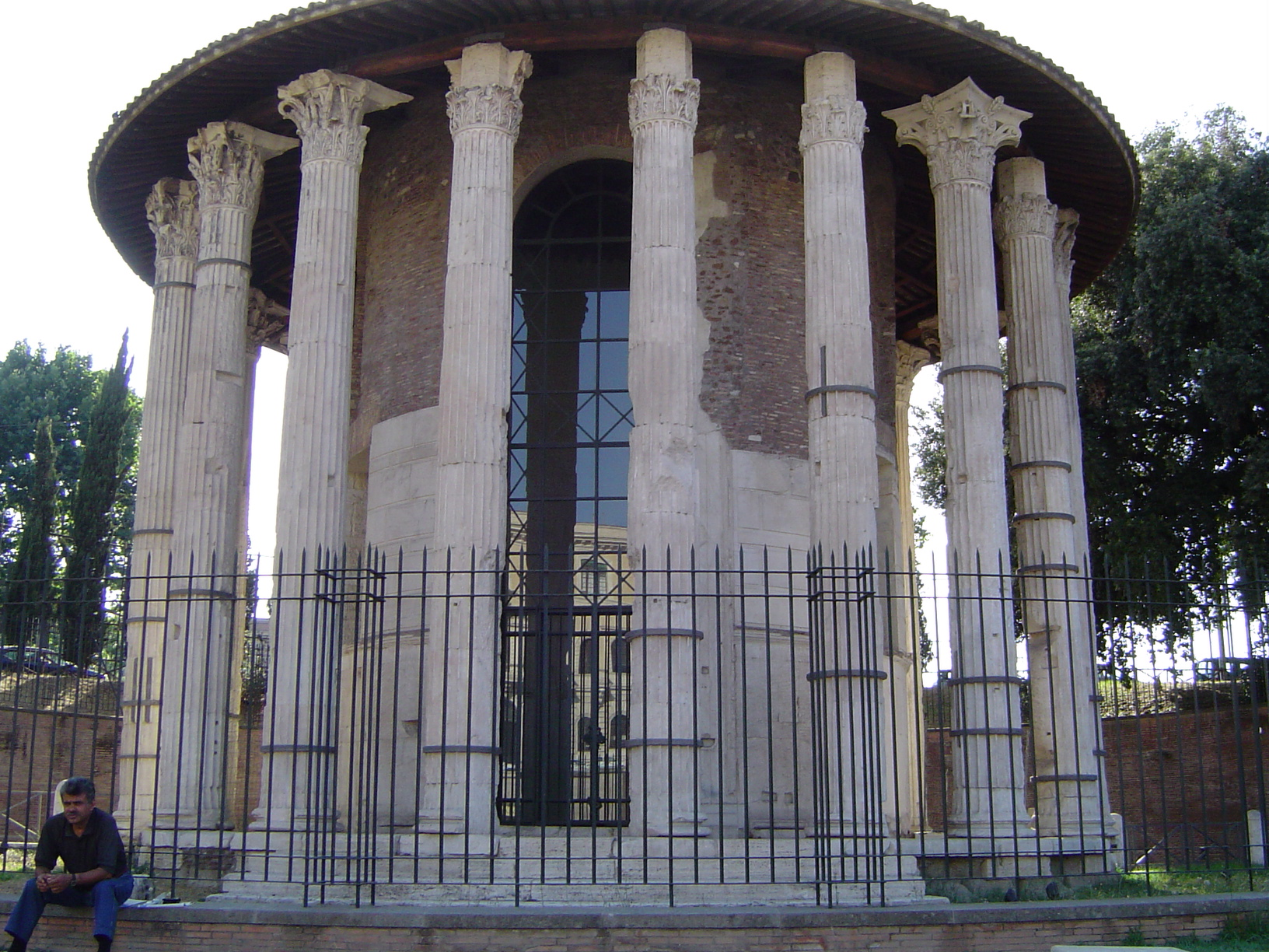 Diana (görög megfelelője Artemisz) istennő temploma az ókori római emlékhelyen